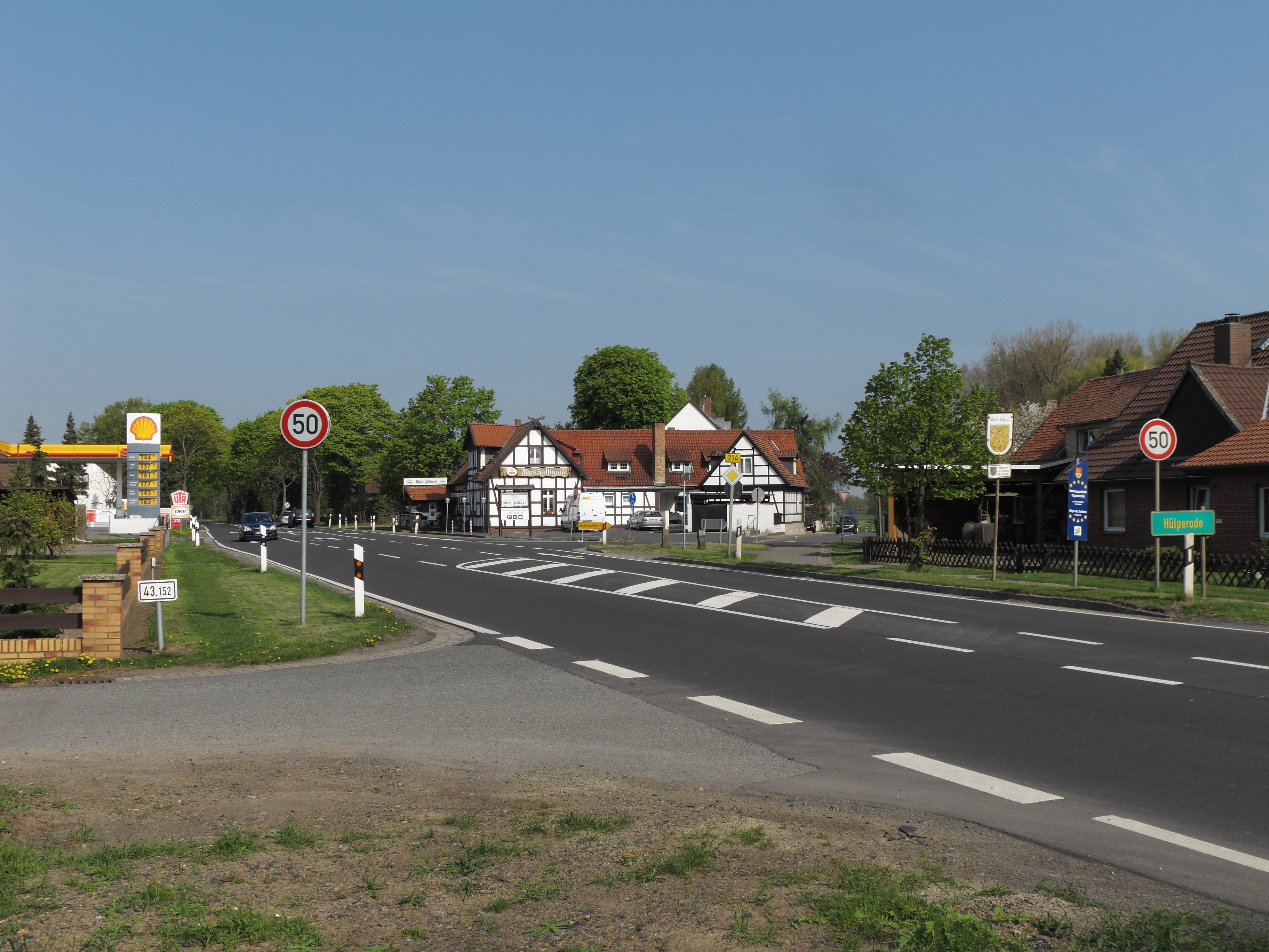 Hülperode, Ortsteil von Schwülper